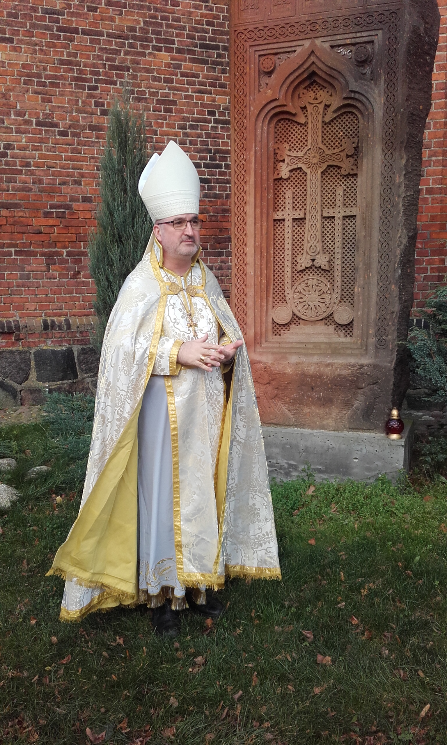 mitrat Henryk Błaszczyk